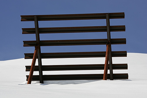 Lawinenverbauung auf Belalp